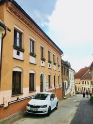 Gansův dům, bývalý židovský chudobinec, na fotografii z roku 2018. Nerudova 629/6, Česká Lípa.